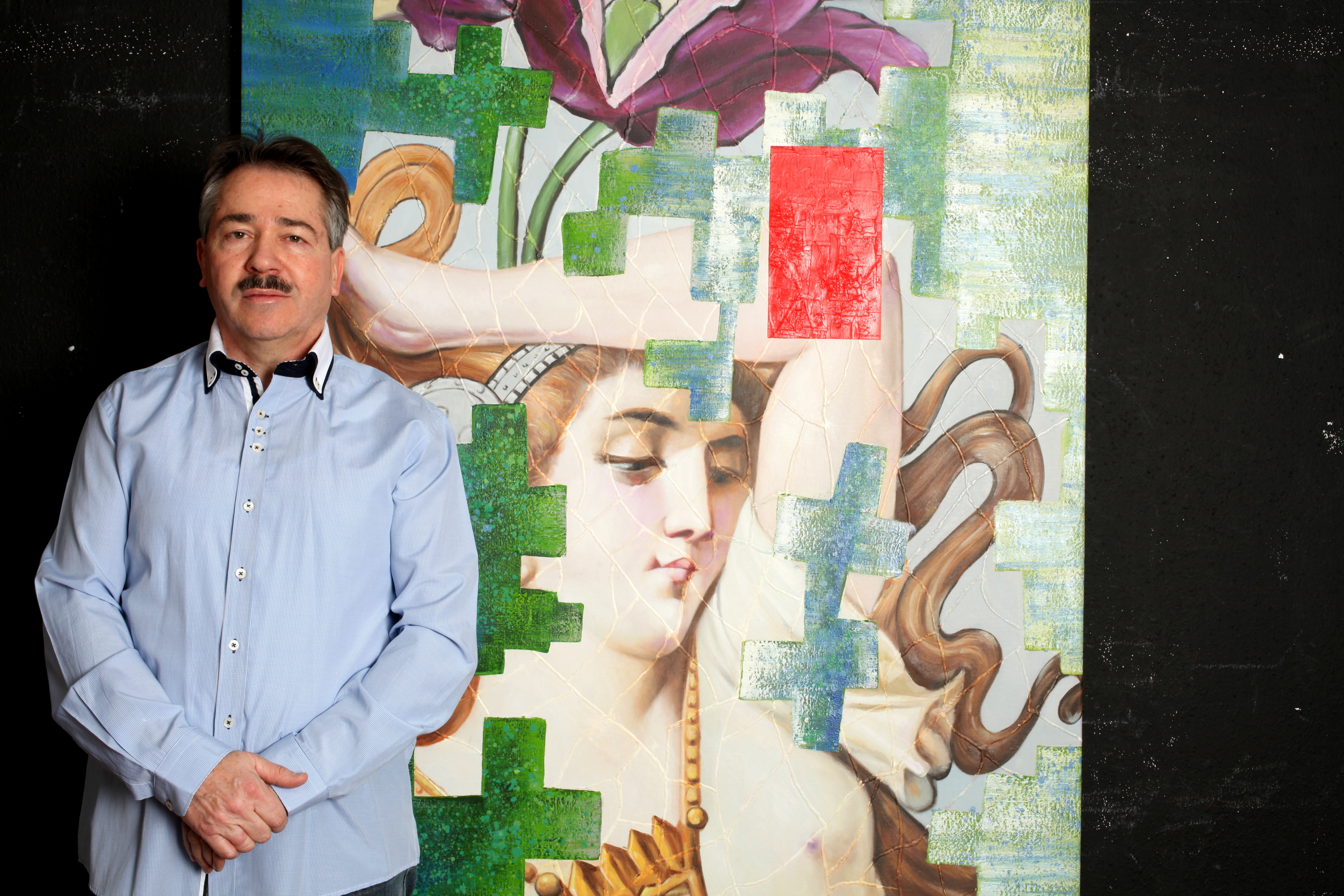 Альбер Вебер